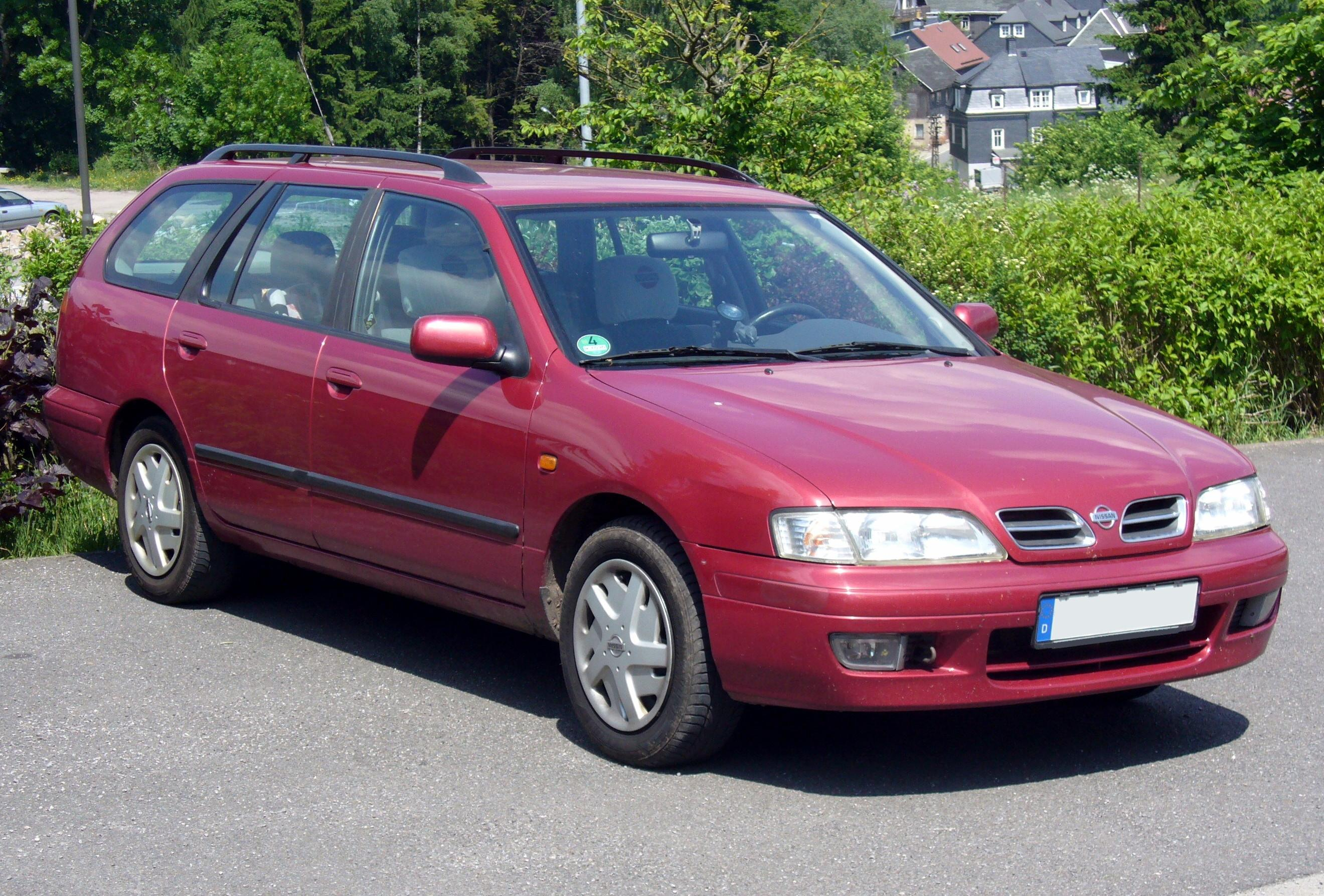 Nissan Primera Traveller